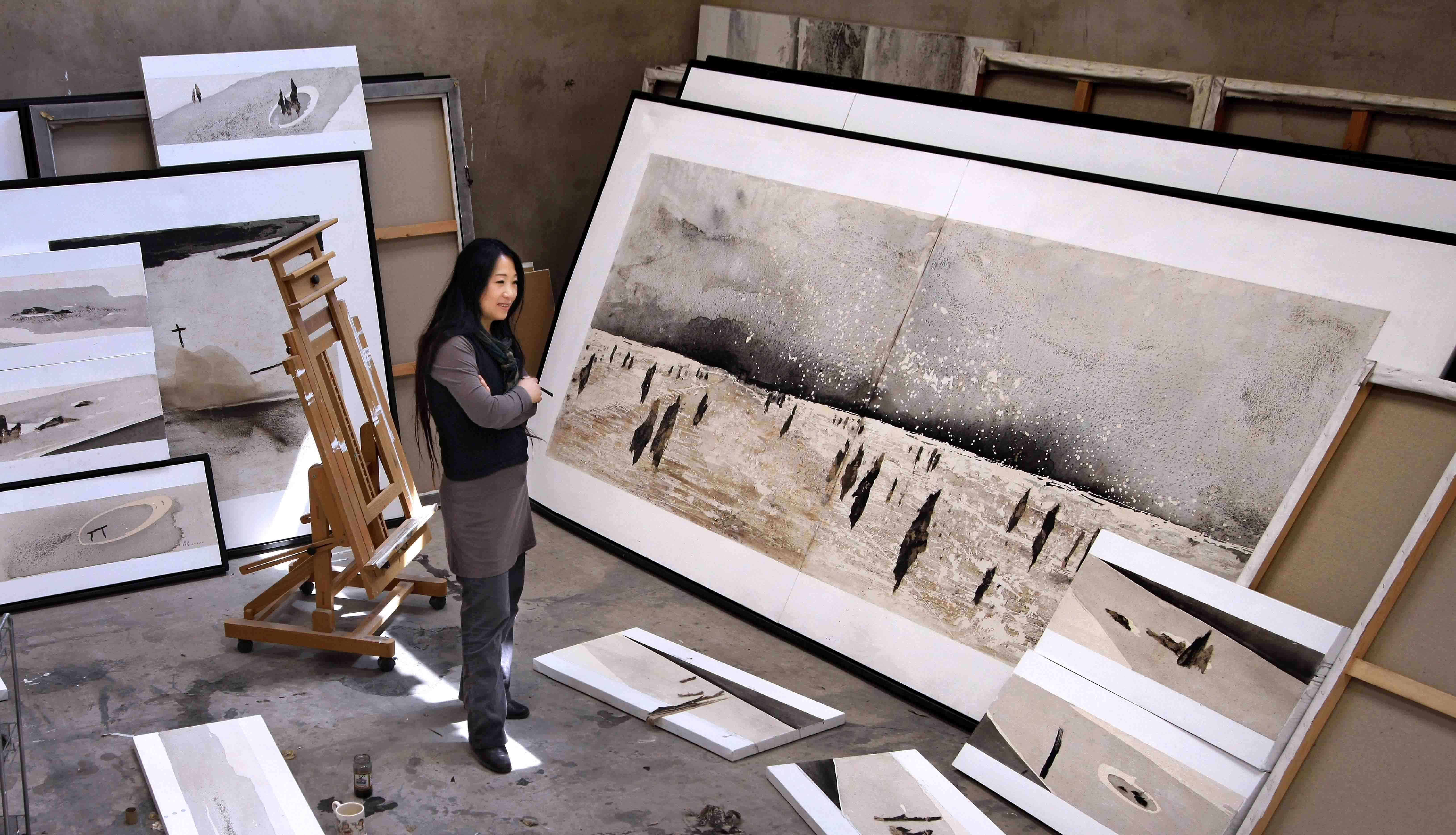 Li Chevalier dans son studio à Pékin